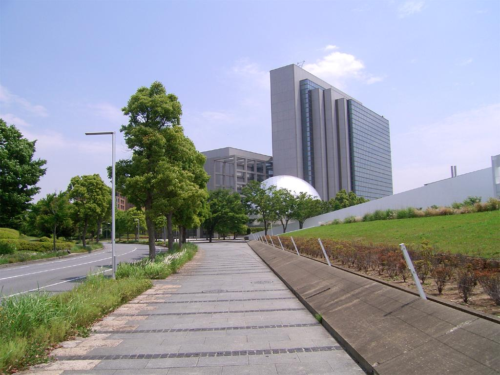 Mizuho Bank Chiba Business Center